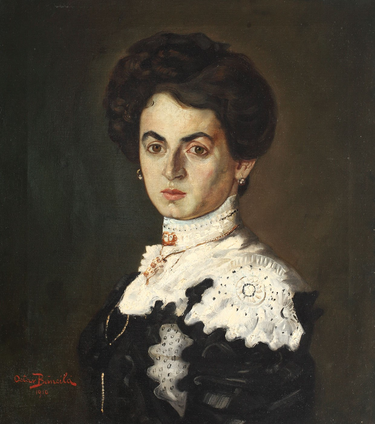 Sofia Băncilă (c. Nădejde), sora lui Octav Băncilă, ulei pe pânză, 60 × 54 cm, semnat și datat stânga jos, cu roșu, "Octav Băncilă, 1910"